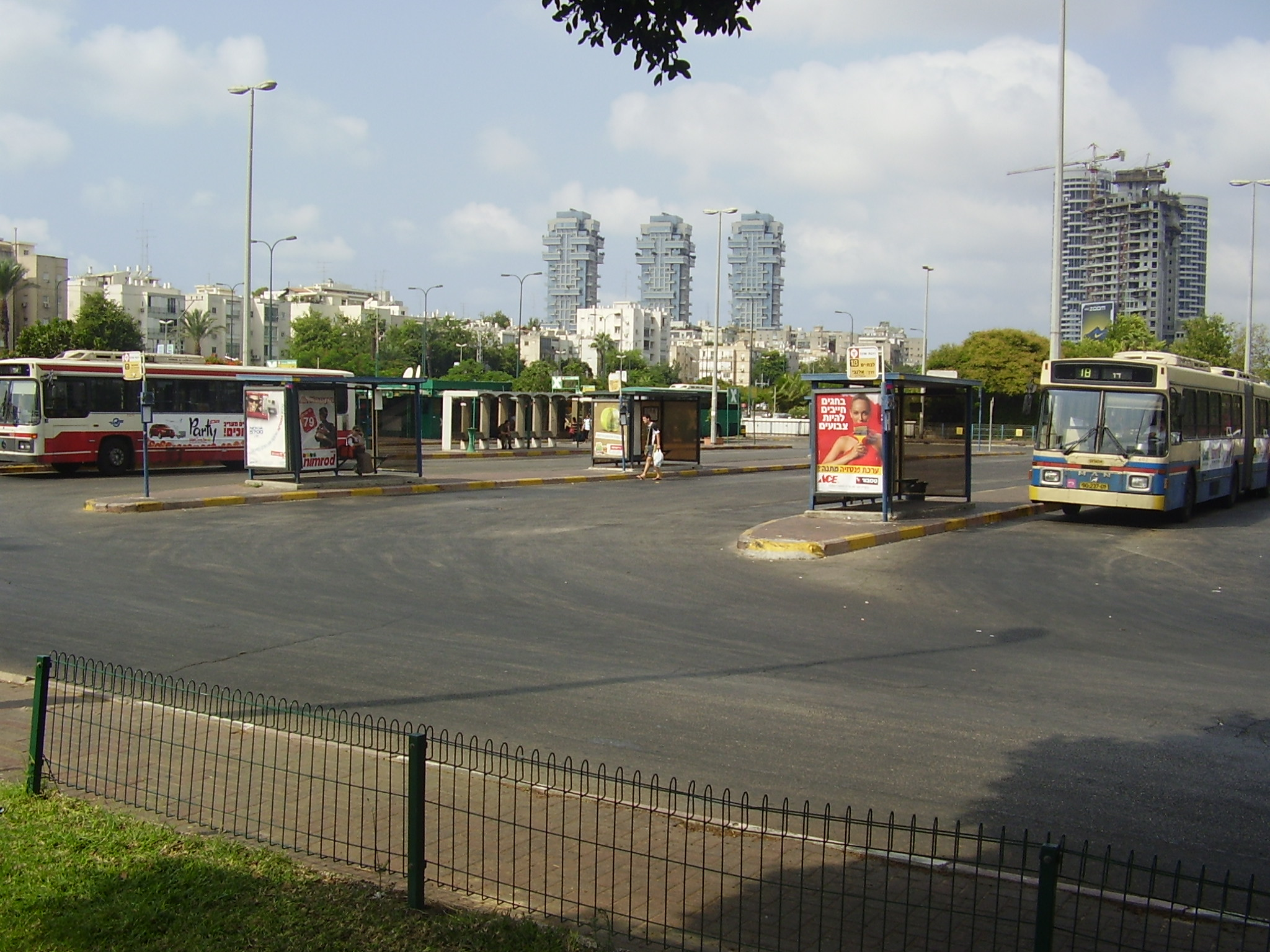 מסוף 2000 בתל אביב Tel Aviv 2000 Terminal, Israel